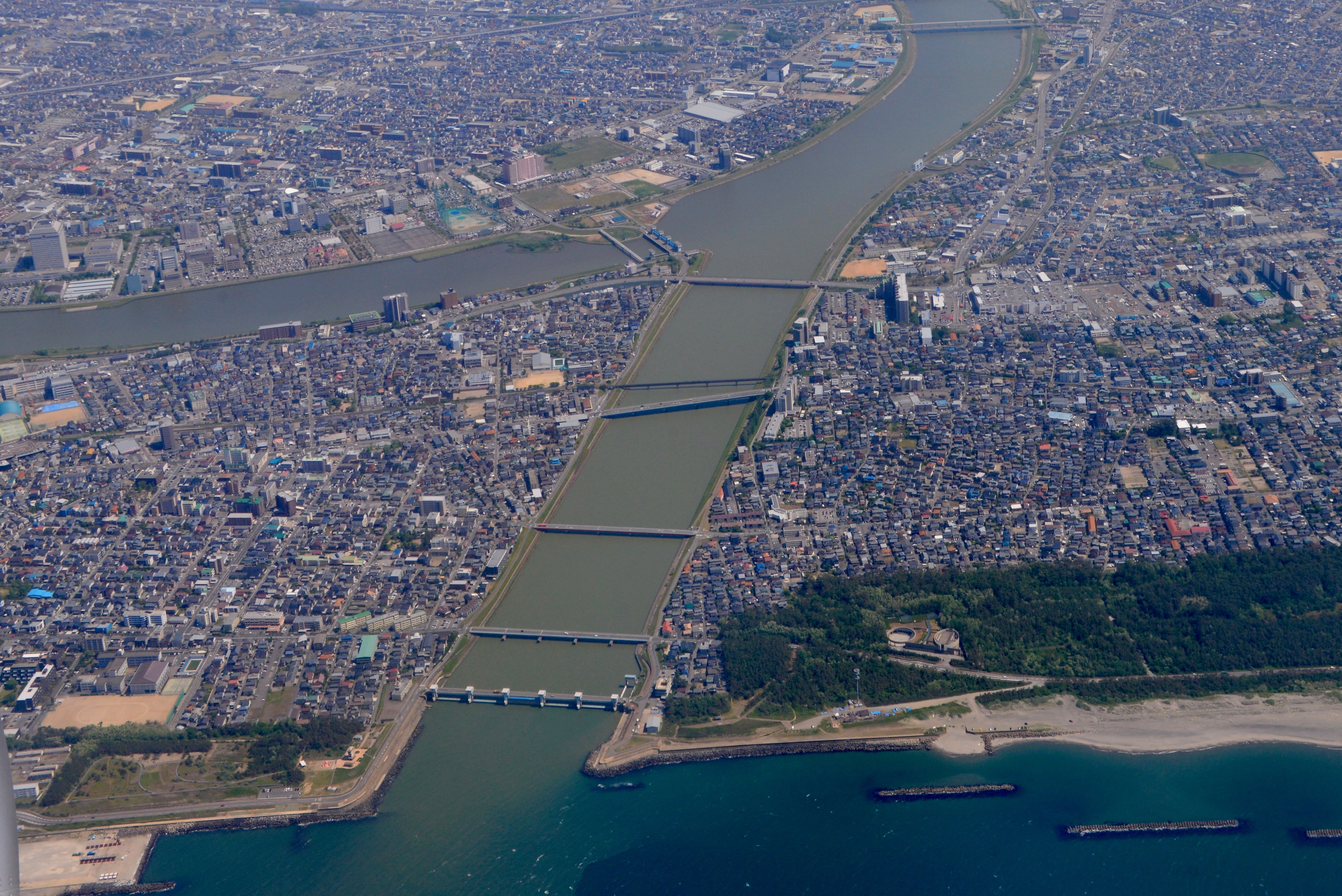 関屋分水路。新潟空港から離陸する機内より撮影